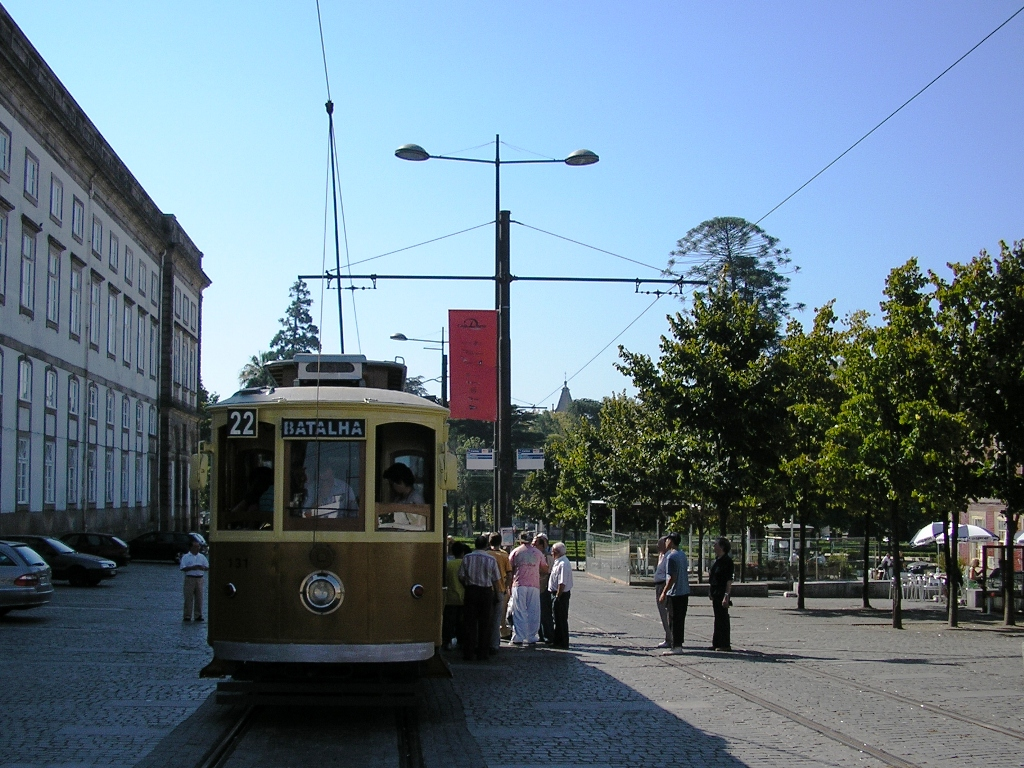 Parada Leitão Square in Porto, Portugal